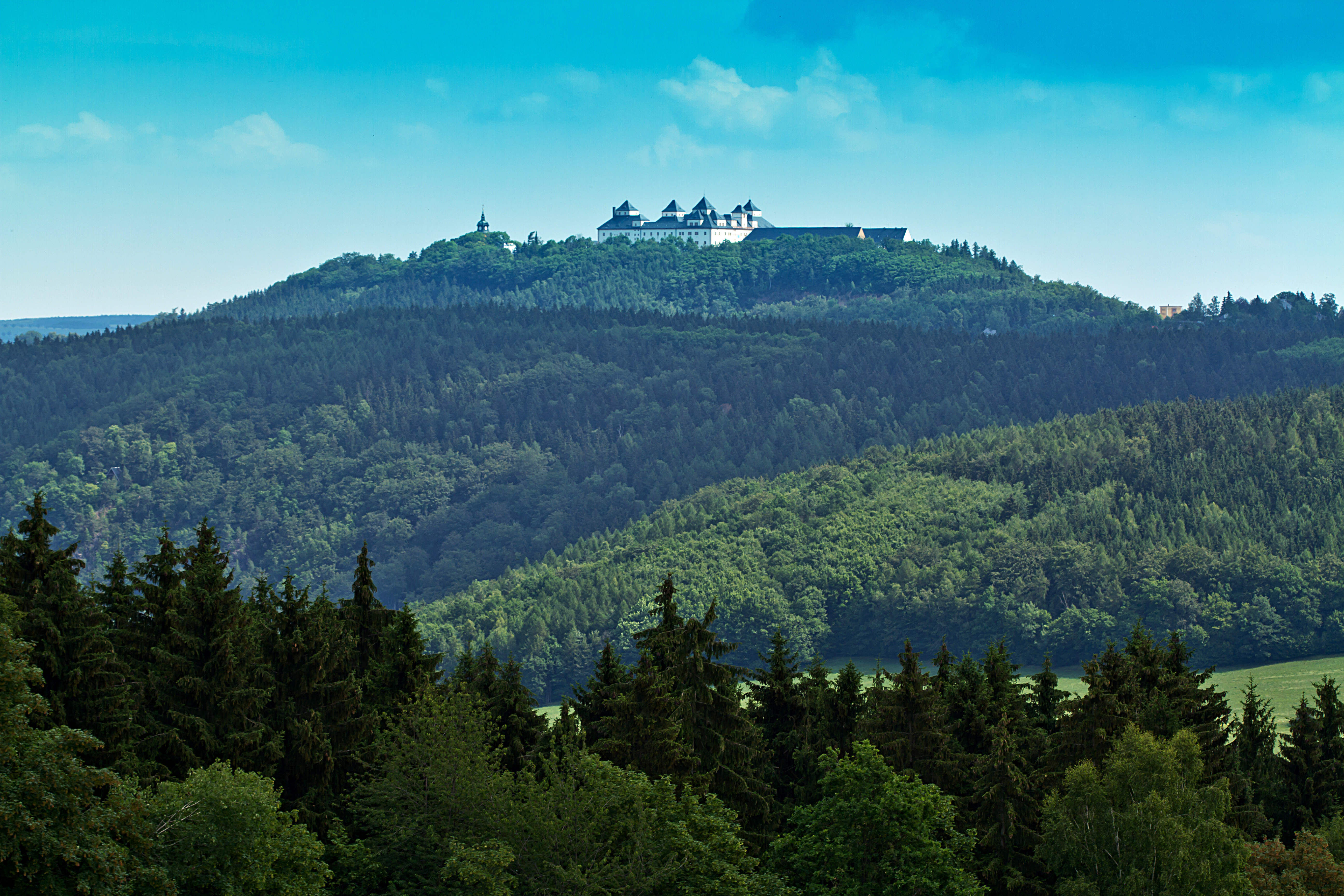 Sachsen: Jagdschloss Augustusburg